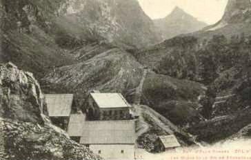 Le mines et le pic Penemédaa - Gourette - France